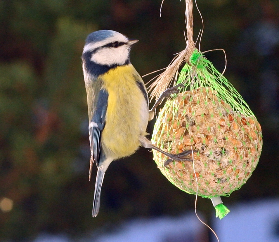 Blåmeis - Blue tit - Cyanistes caeruleus